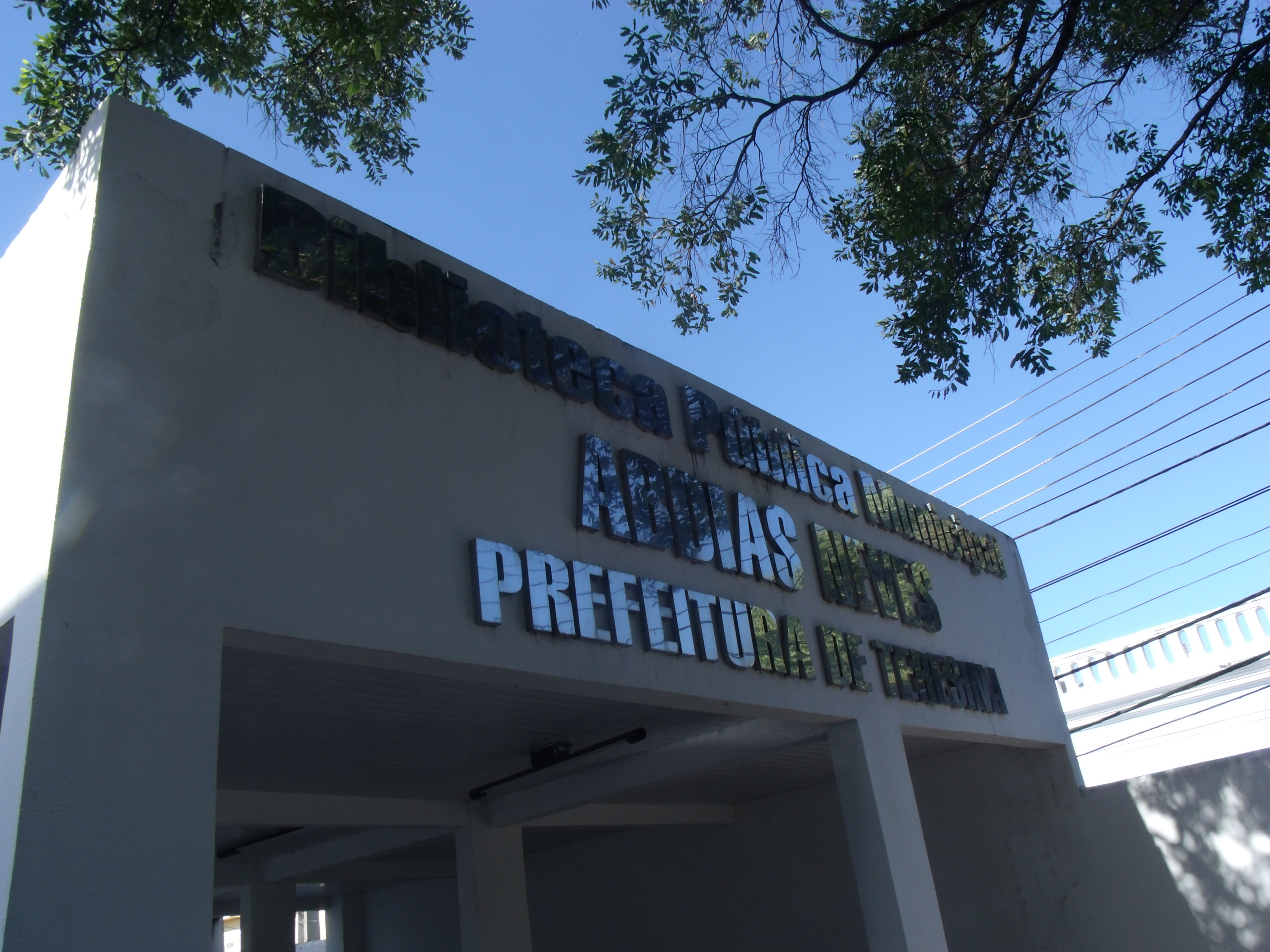 Vista do letreiro da Biblioteca Pública Municipal Abdias Neves da Prefeitura de Teresina, no Piauí.